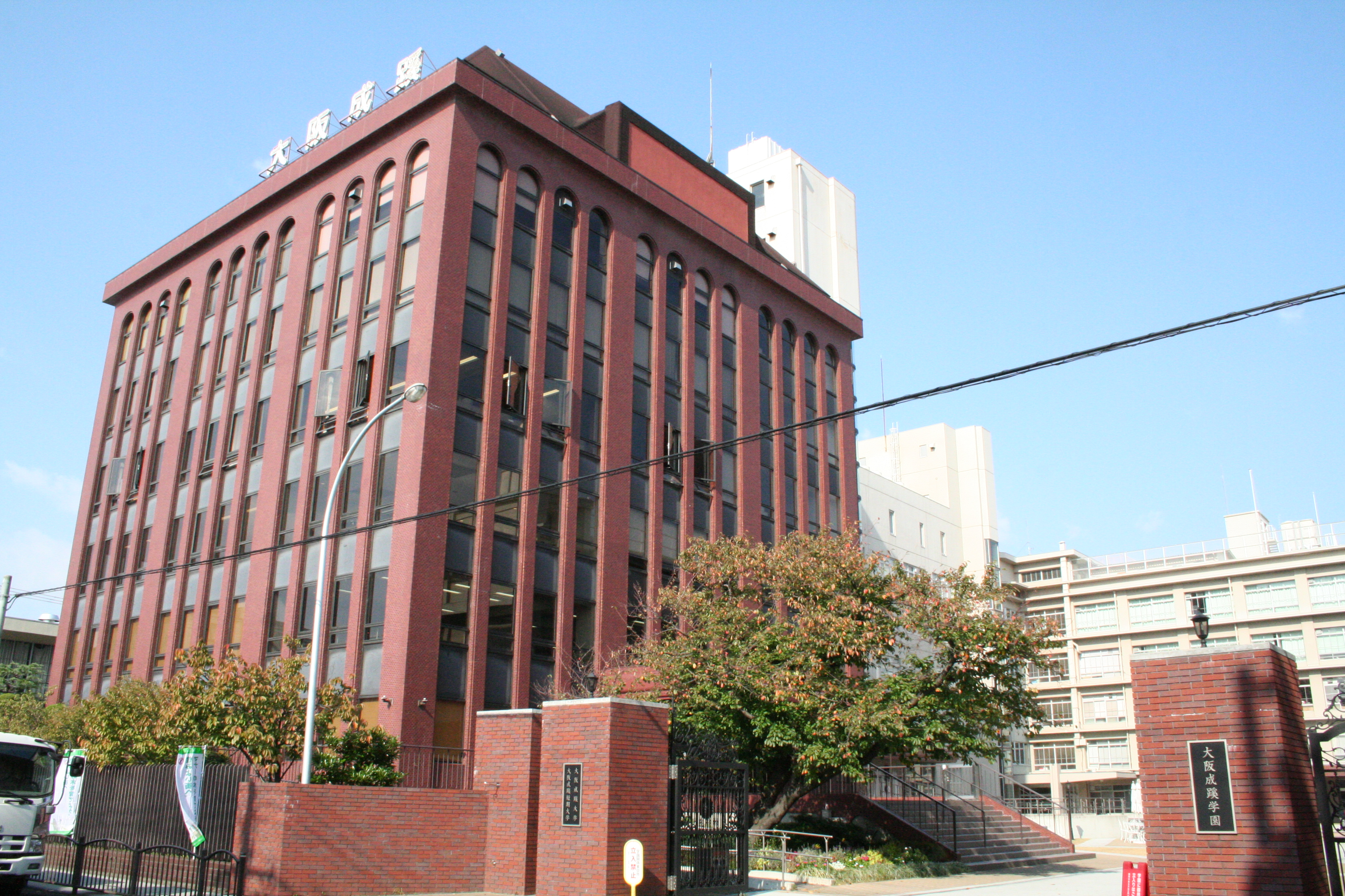 大阪成蹊大学・大阪成蹊短期大学